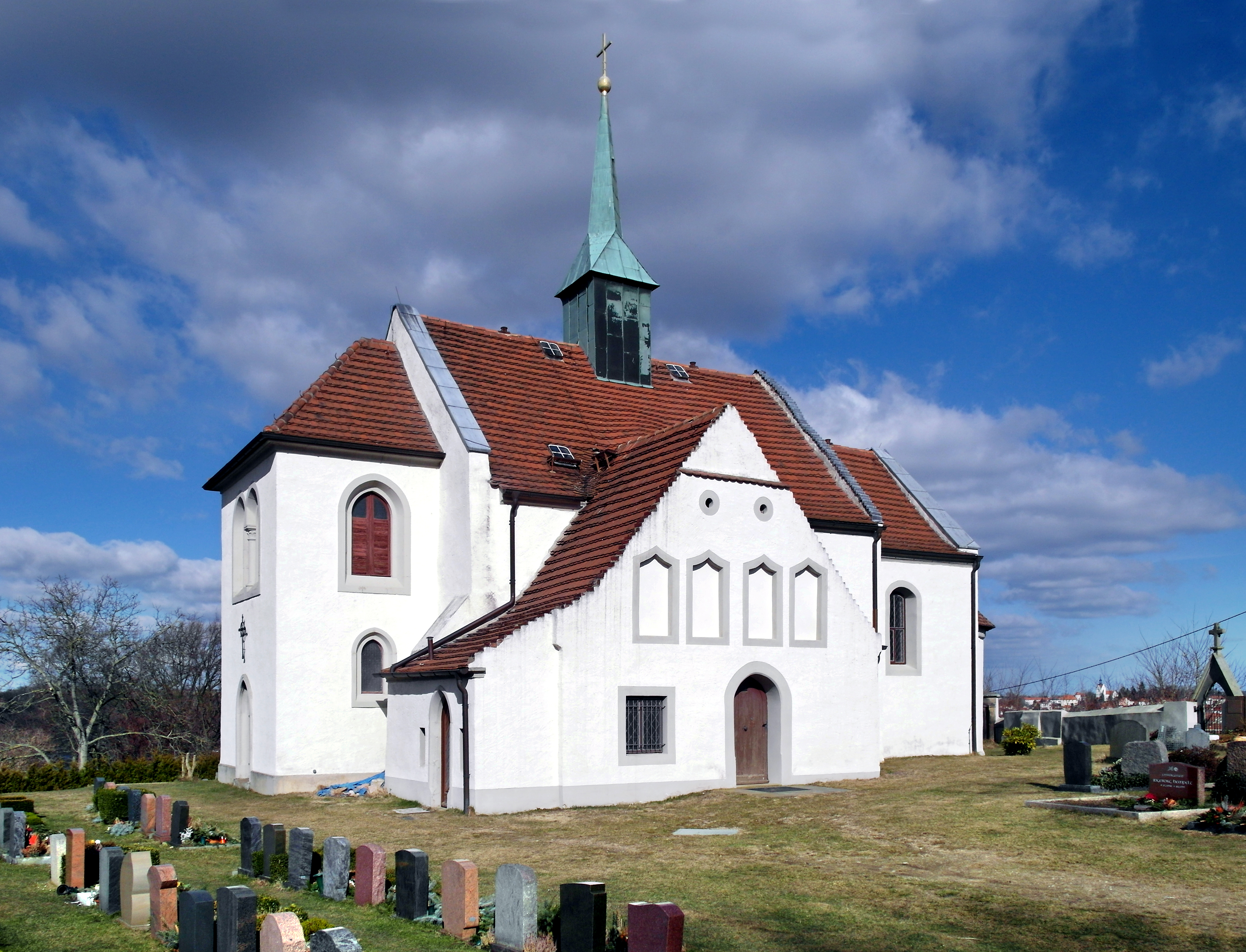 24.02.2018 01662 Meißen, Kapellenweg 4A auf dem Plossen: Die Kapelle St. Martin (GMP: 51.160254,13.476616) ist eine der ältesten Kirchen Meißens, bereits in der 2. Hälfte des 12. Jahrhunderts erbaut. Sicht von Süden. [SAM4268.JPG]20180224190DR.JPG(c)Blobelt